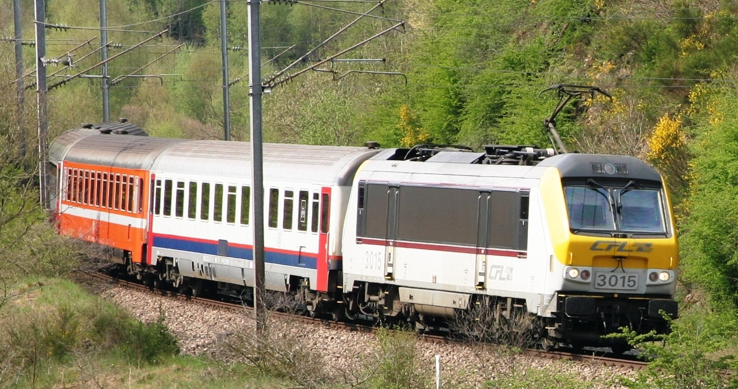 Den InterRegio m op der CFL-Linn 10 um Pk. 81,800. Den Zuch kennt vun Ëlwen a fiert Richtung Klierf